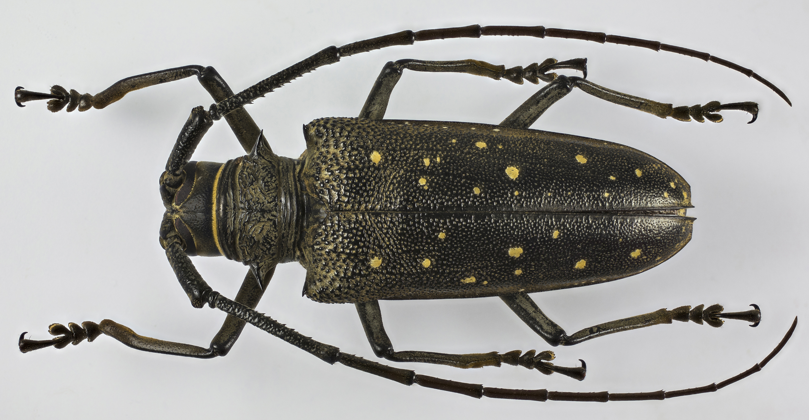 Size: 56mm Location: Indonesien, Halmahera Photo: Chr. Hösl 2013